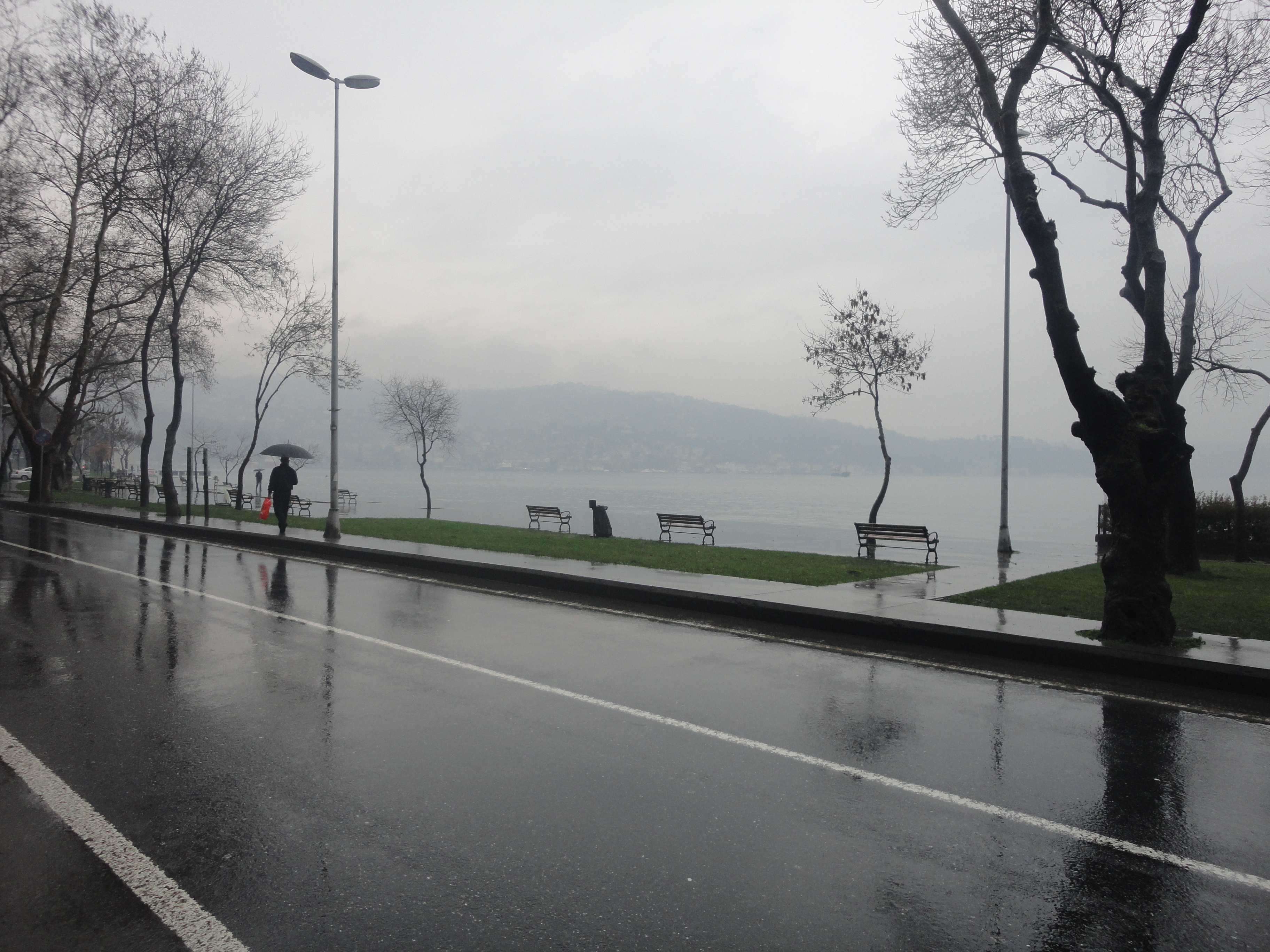 Kireçburnu Sahili'nden bir görünüm.